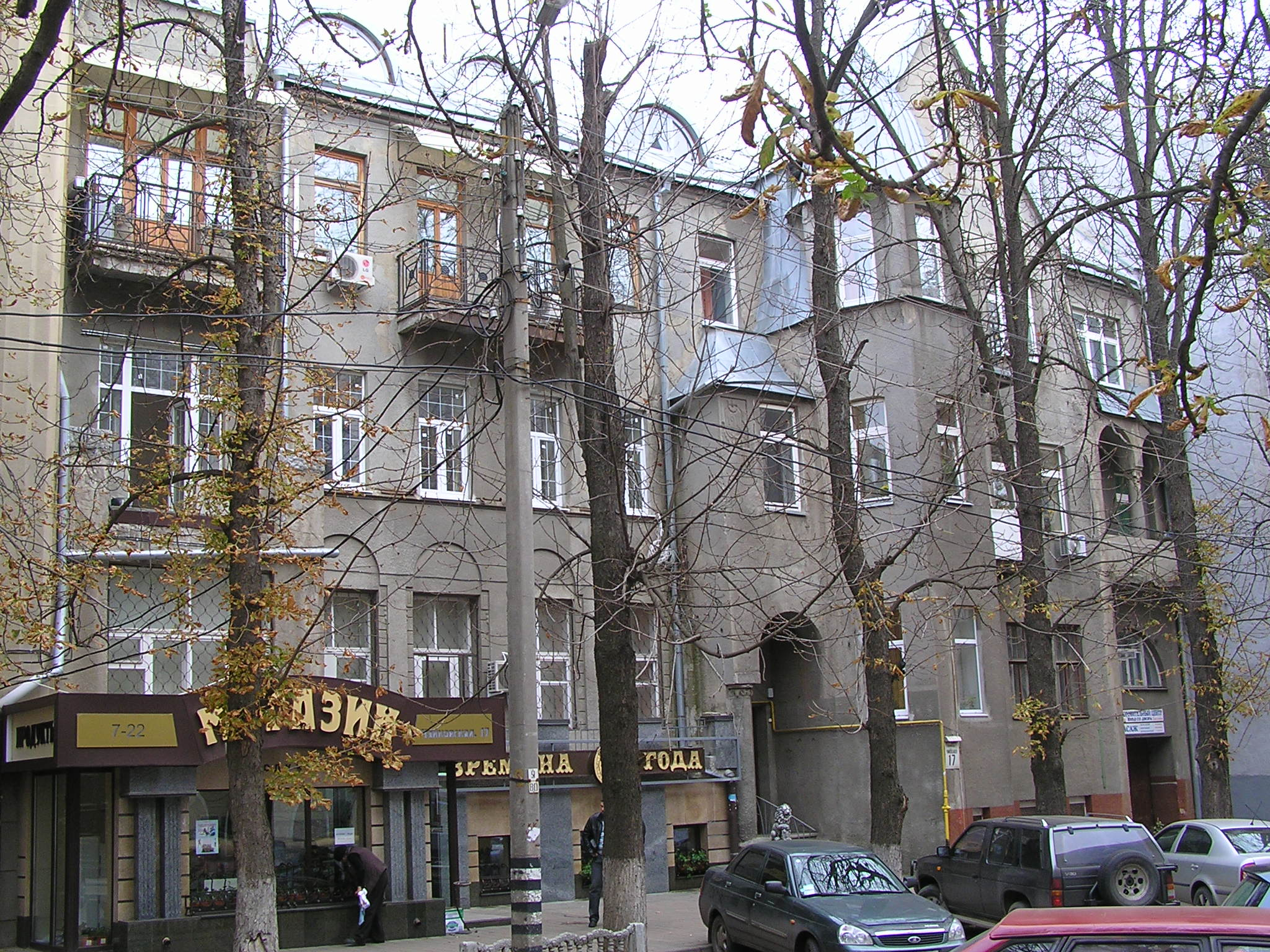 Житловий будинок 1911р., вул.Чайковська,17, м.Харків